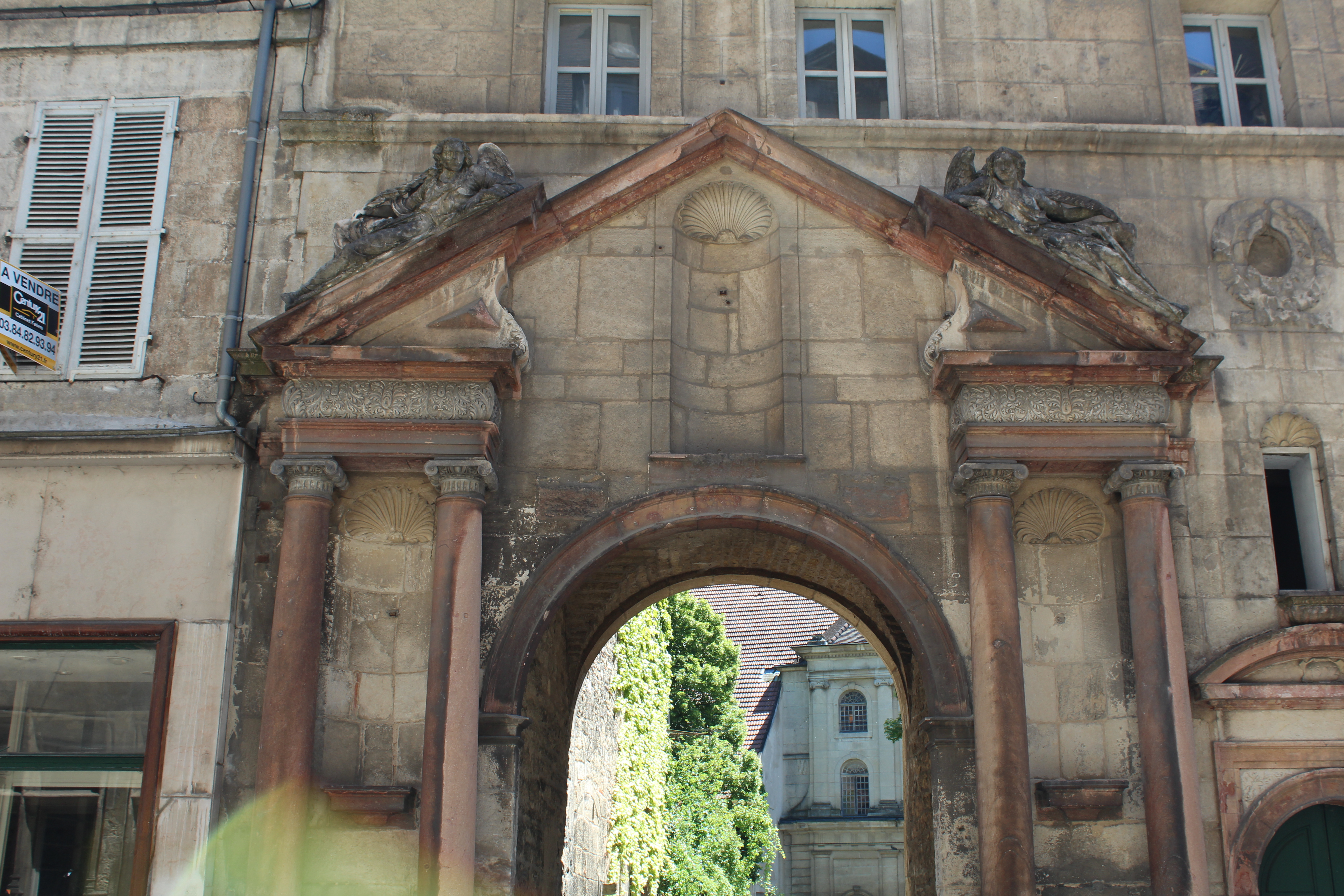 Immeuble, 41 rue des Arènes, Dole.